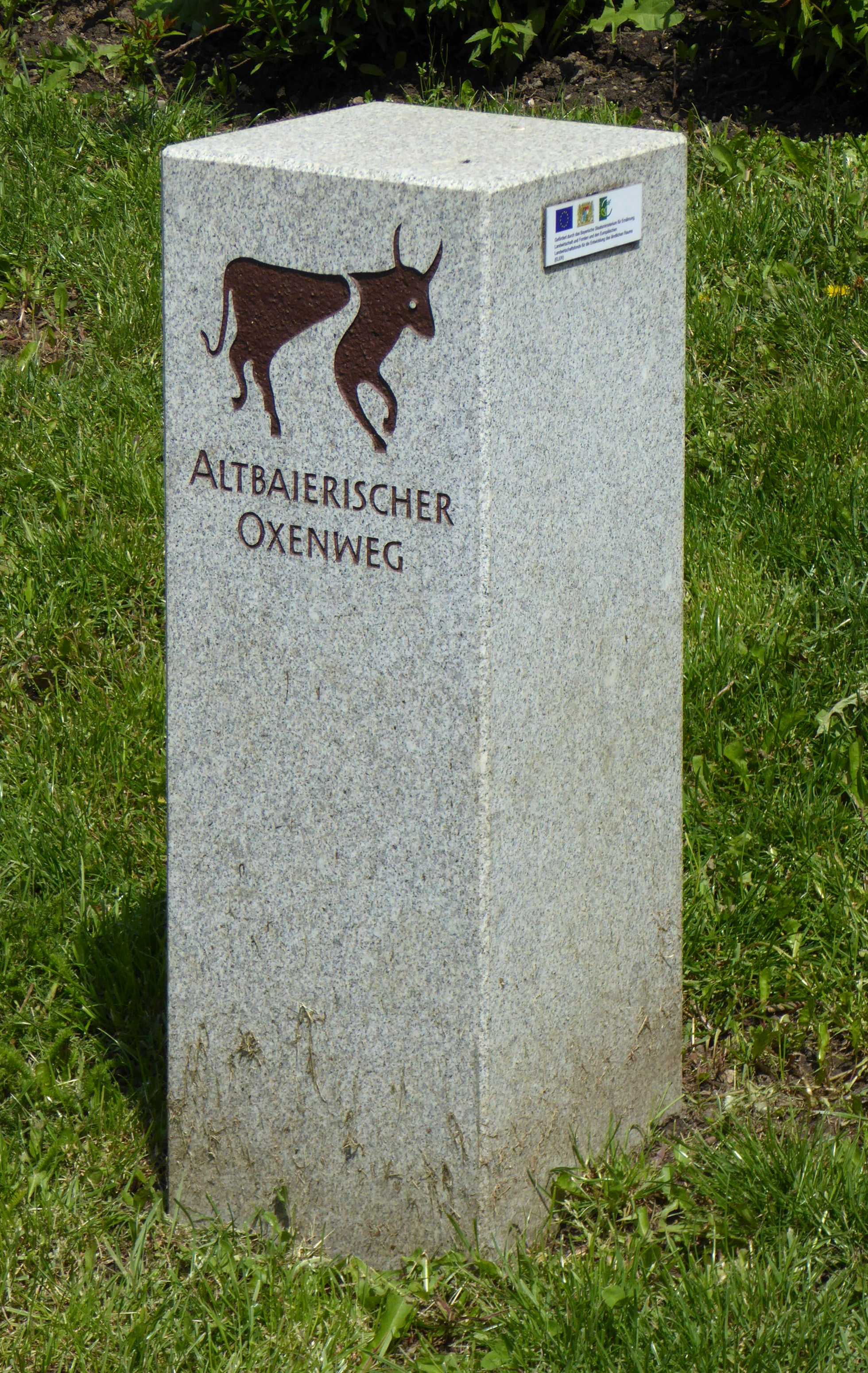 Markierung des Altbairischen Oxenwegs in Altomünster.